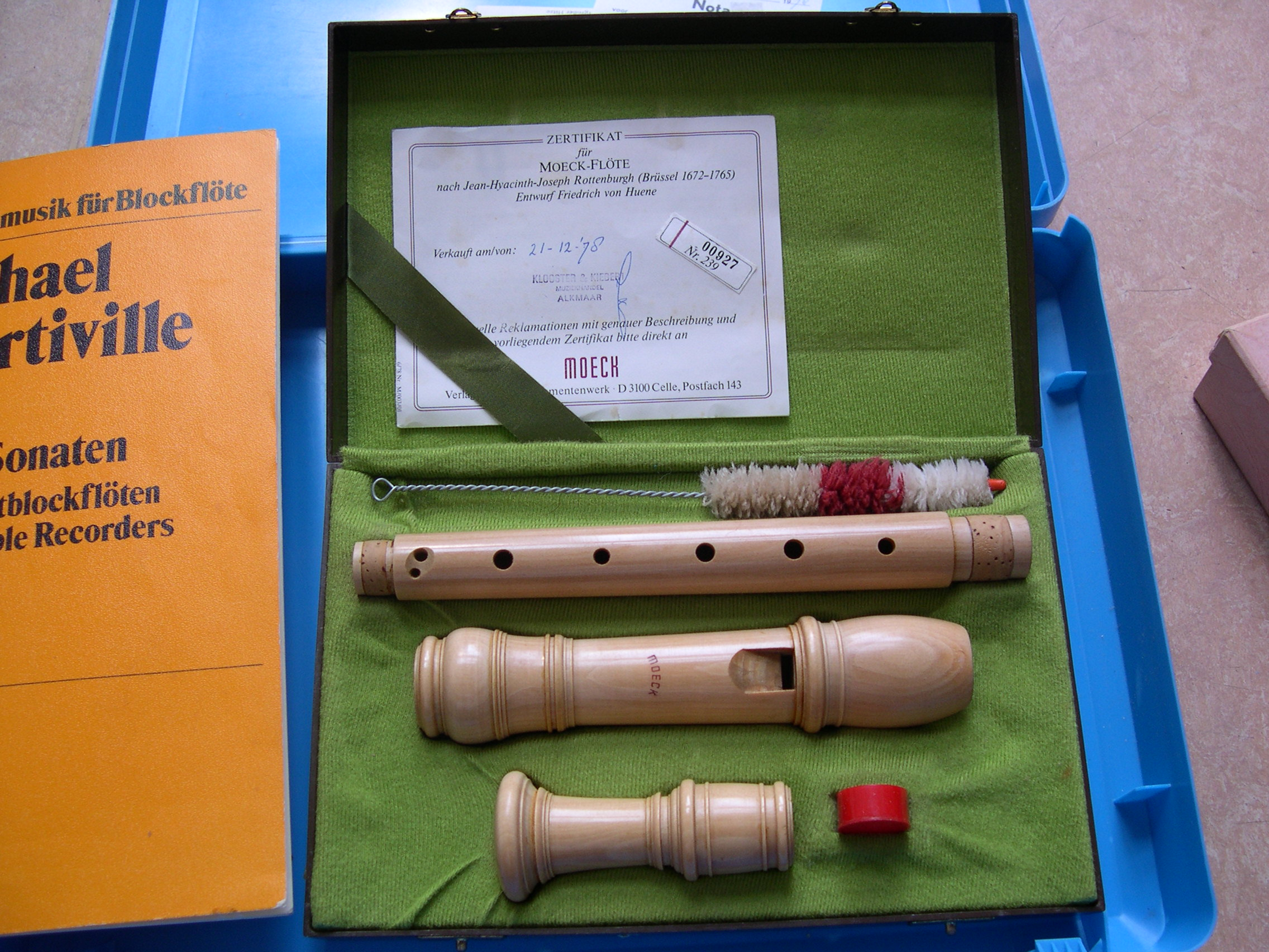 Moeck-Flote nach Jean-Hyacinth-Joseph Rottenburgh (Brussel 1672-1765) Entwurf Friedrich von Huenne